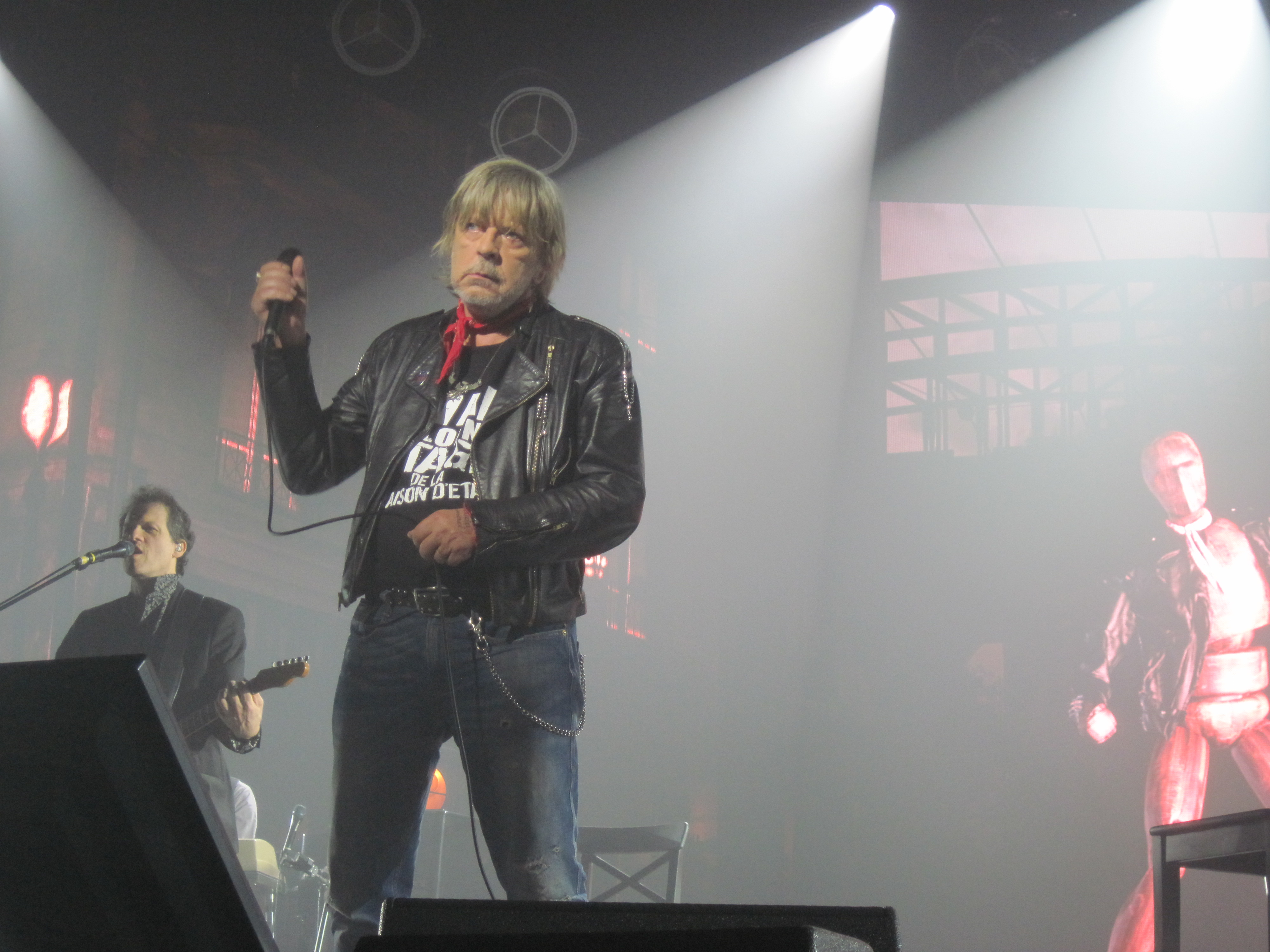 Renaud en concert au Zénith de Paris.